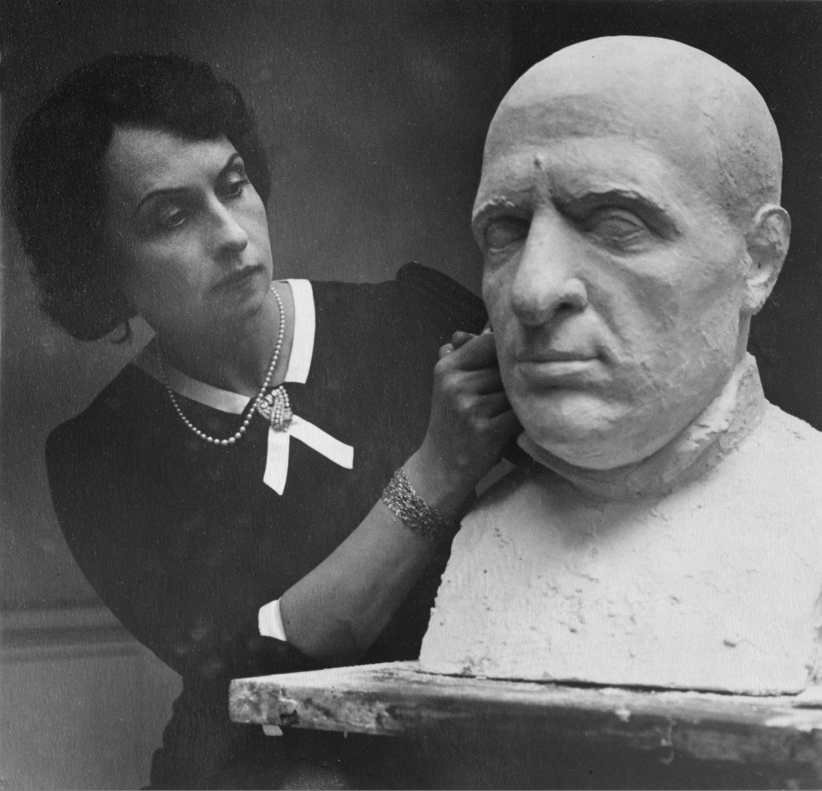 Sigri Welhaven i arbeid. Ukjent fotograf, ca. 1935. Fra Byhistorisk samling hos Oslo Museum.